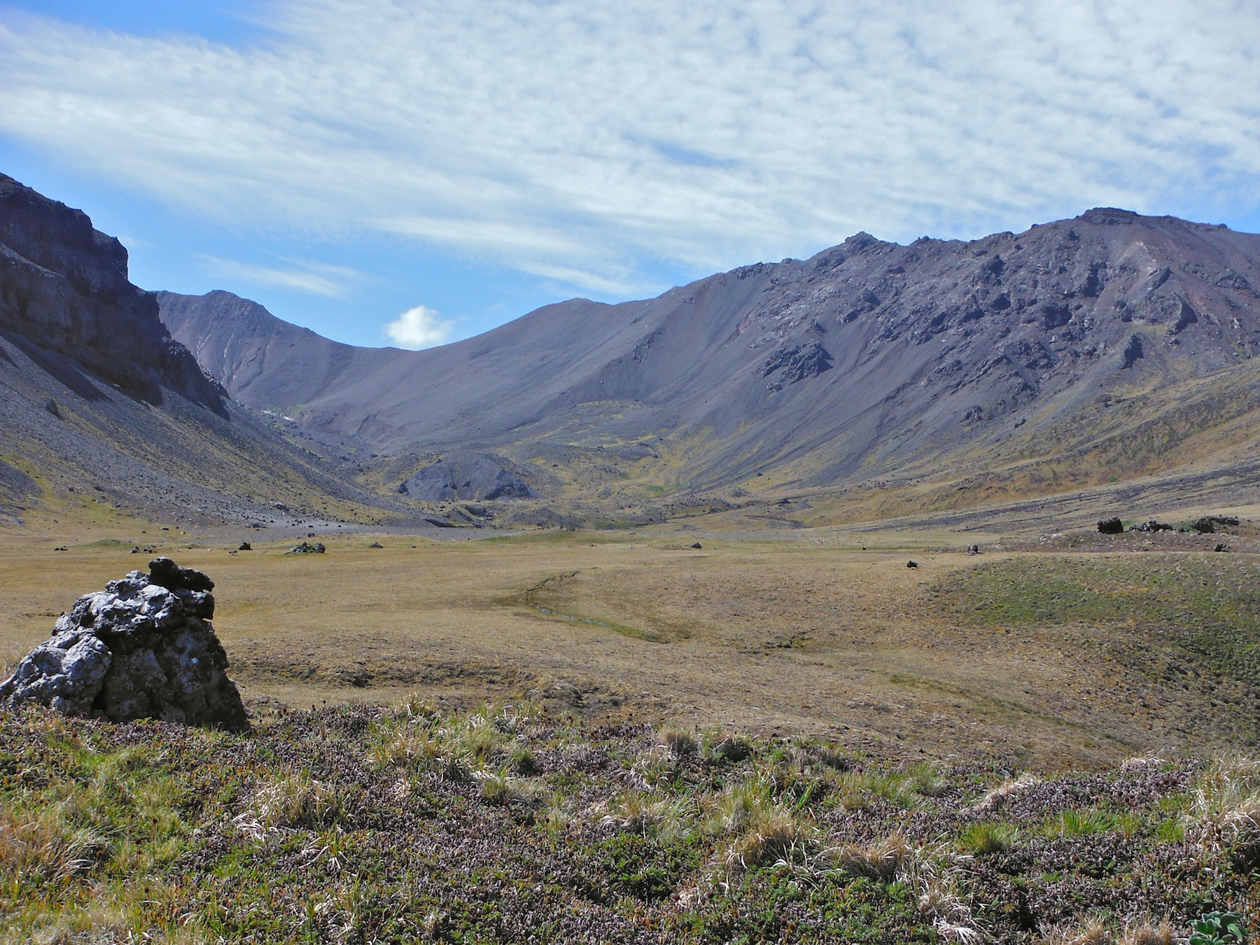 Gigantu ieleja Posesionas salā